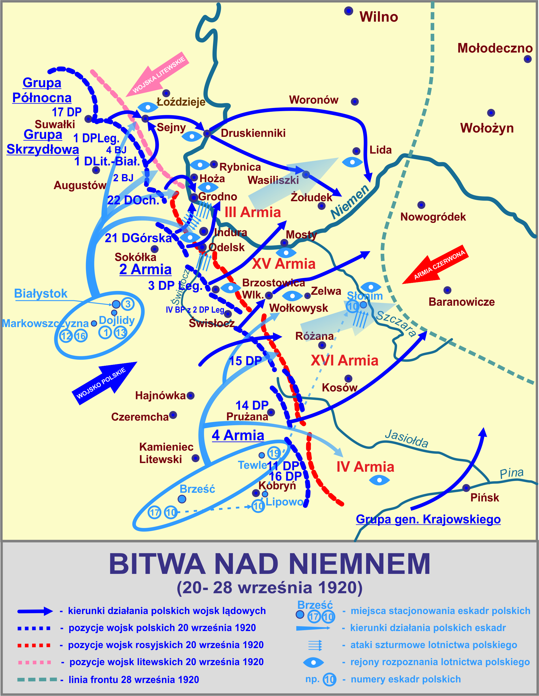 Bitwa nad Niemnem 20 - 28 września 1920 - nowa wersja